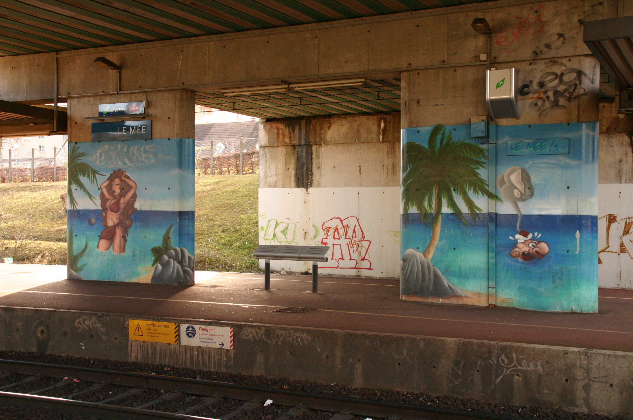 La Gare de Le Mée, Le Mée-sur-Seine , département de la Seine-et-Marne, France